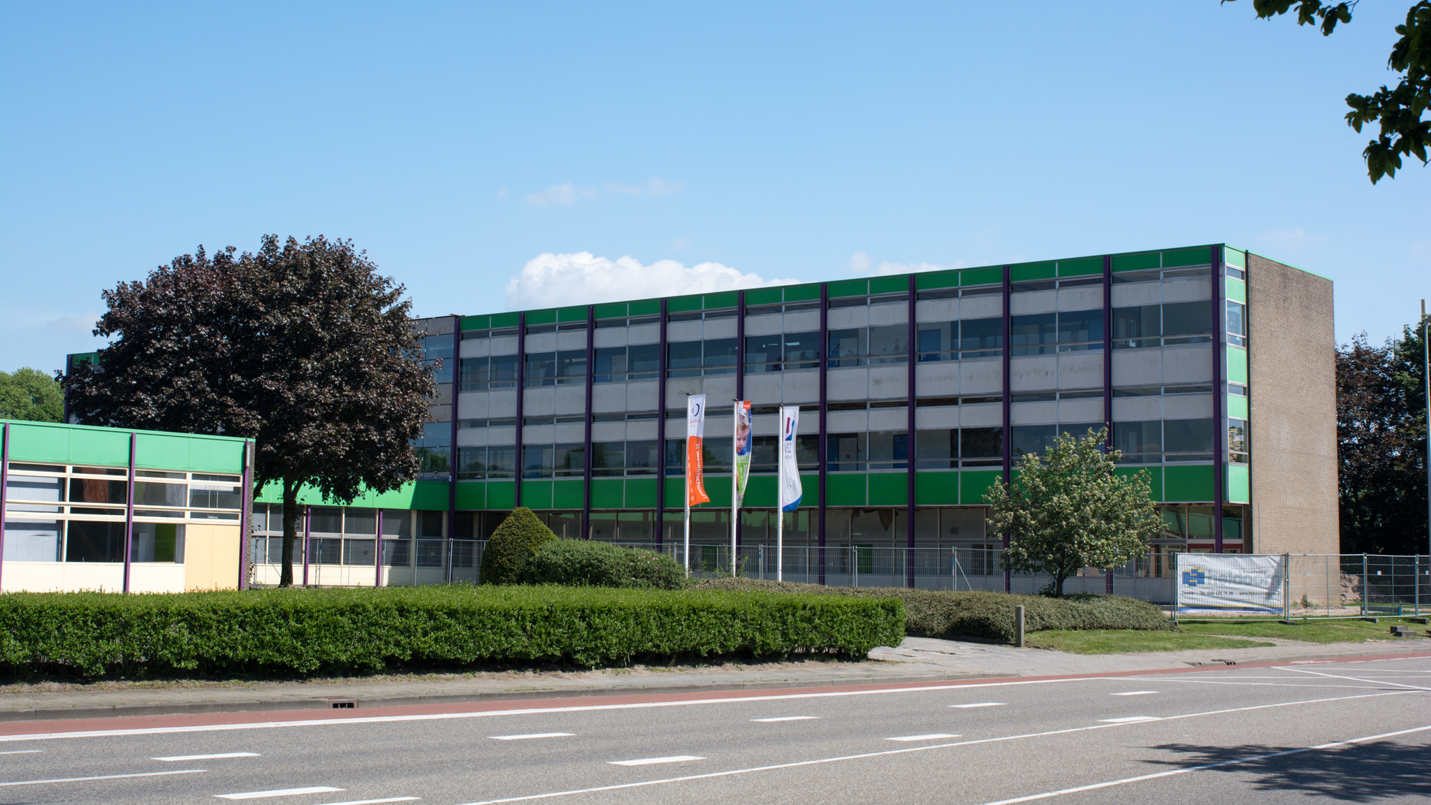 Oude locatie van de scholengemeenschap TalentStad aan de Rieteweg 1, Zwolle